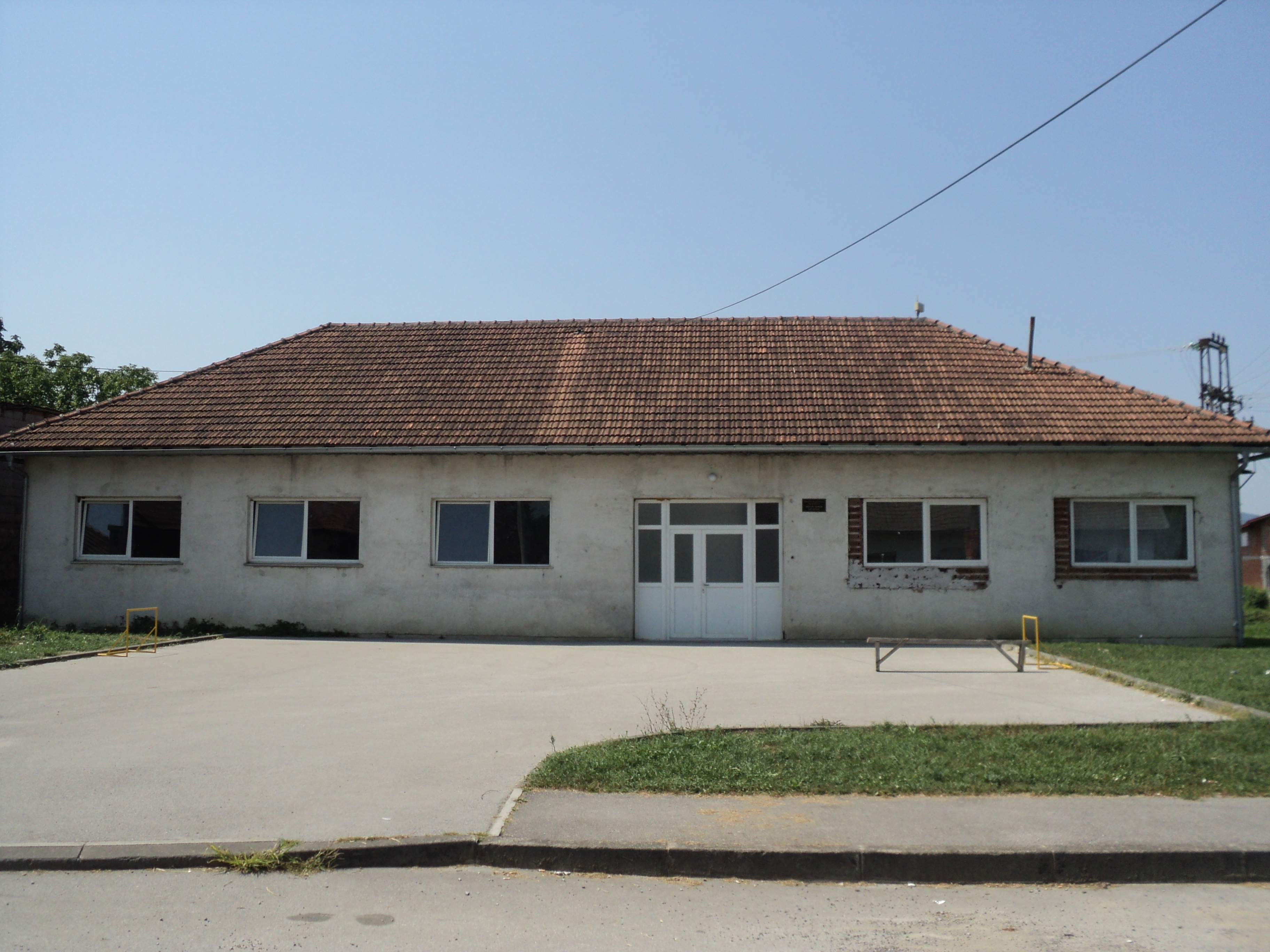 Zgrada mjesnog odbora Levkušje